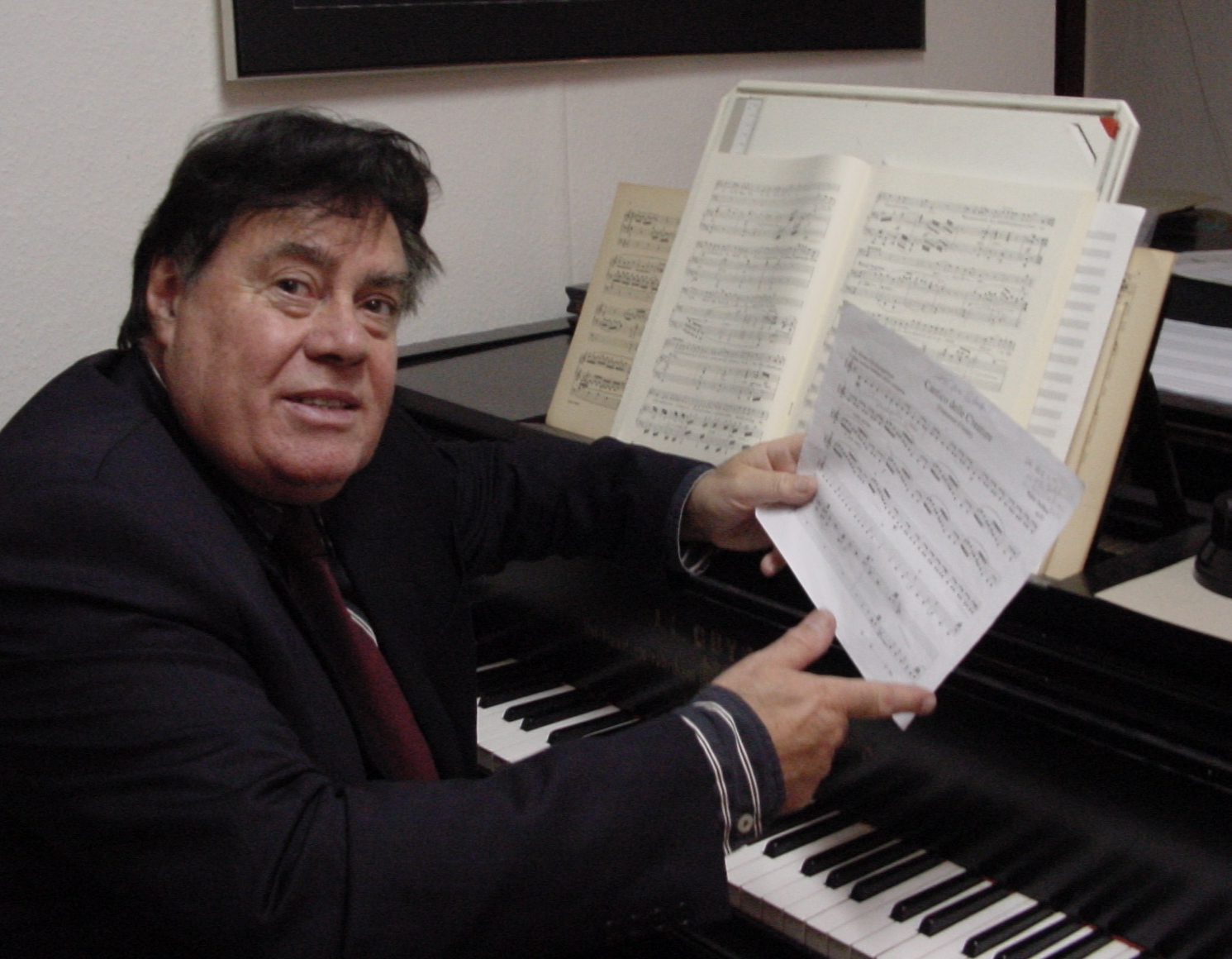 Komponist Walter Steffens am Flügel in Marienmünster